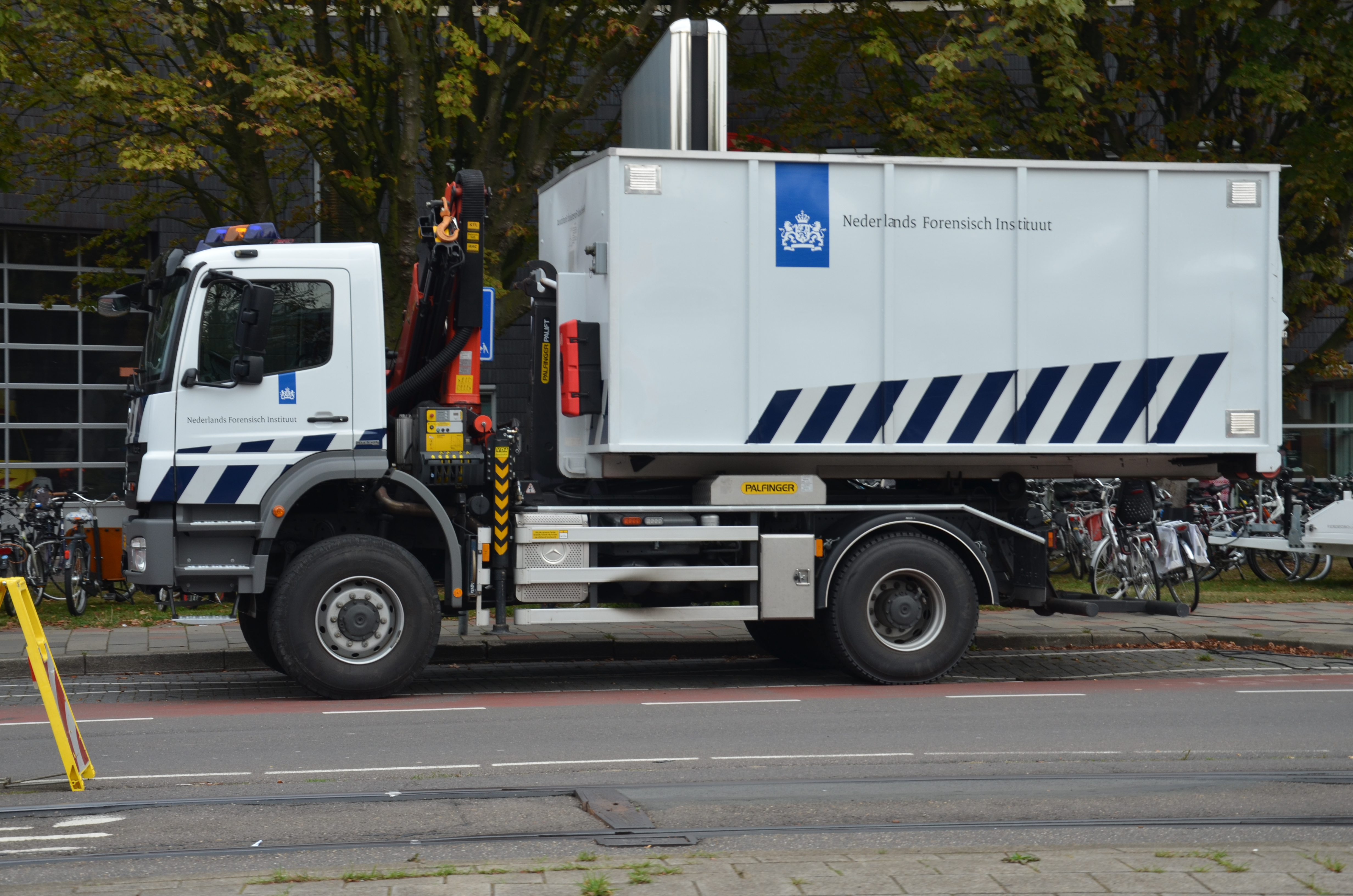 Een voertuig van het Nederlands Forensisch Instituut (NFI).